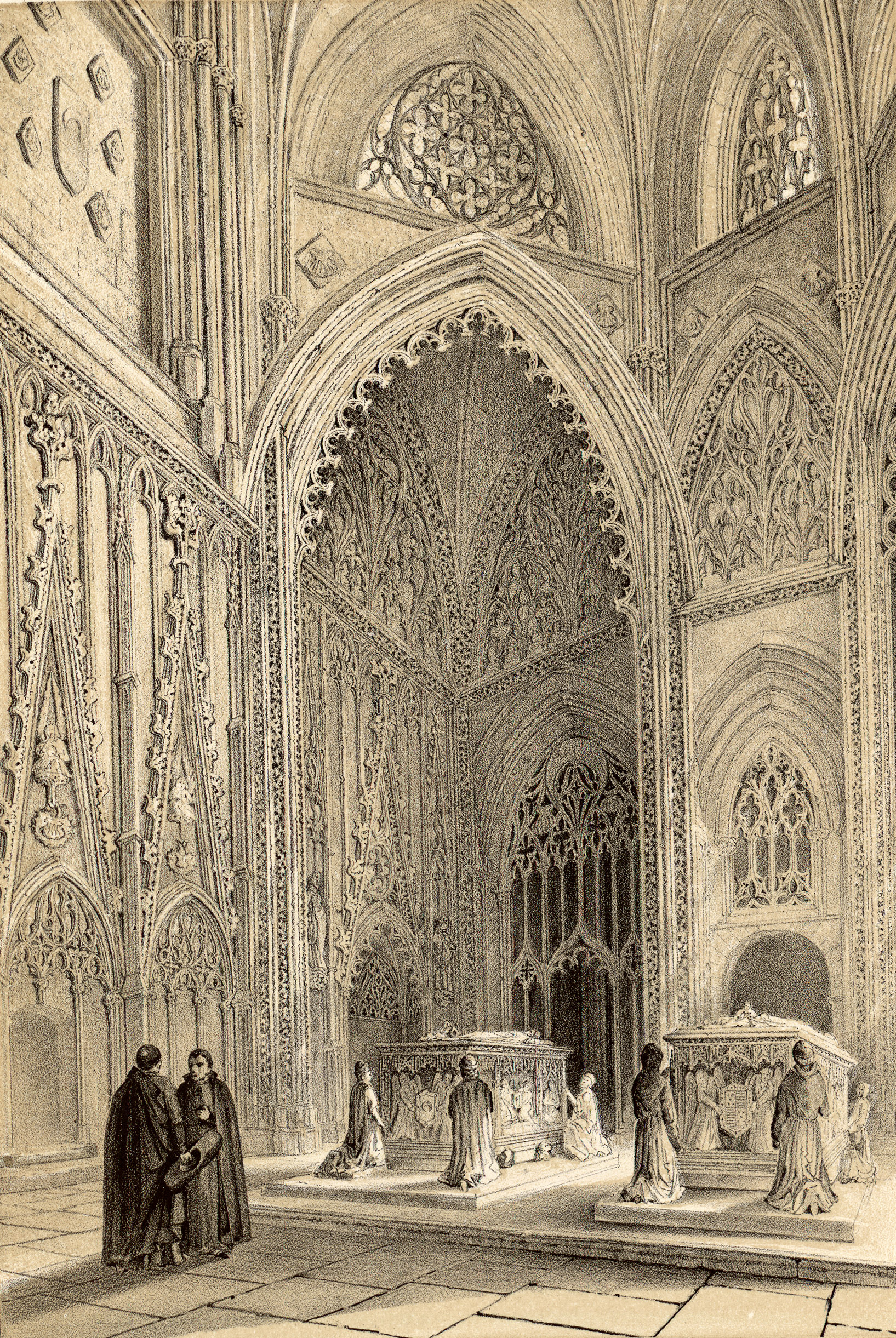 Capilla de don Álvaro de Luna (catedral de Toledo).